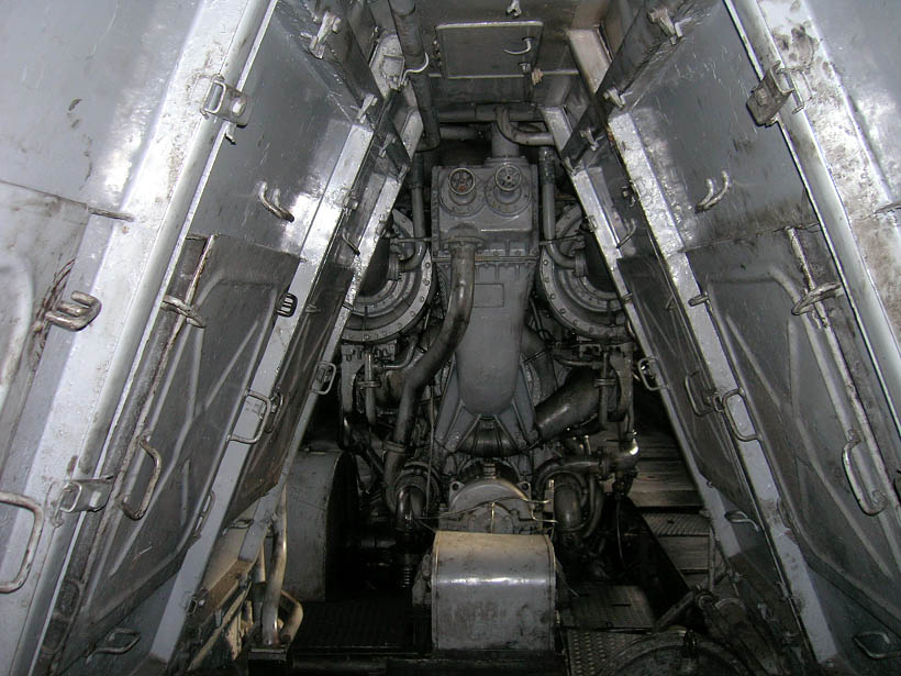 Дизель тепловоза ТЭП60 Вид на агрегаты наддува дизеля тепловоза из шахты холодильника